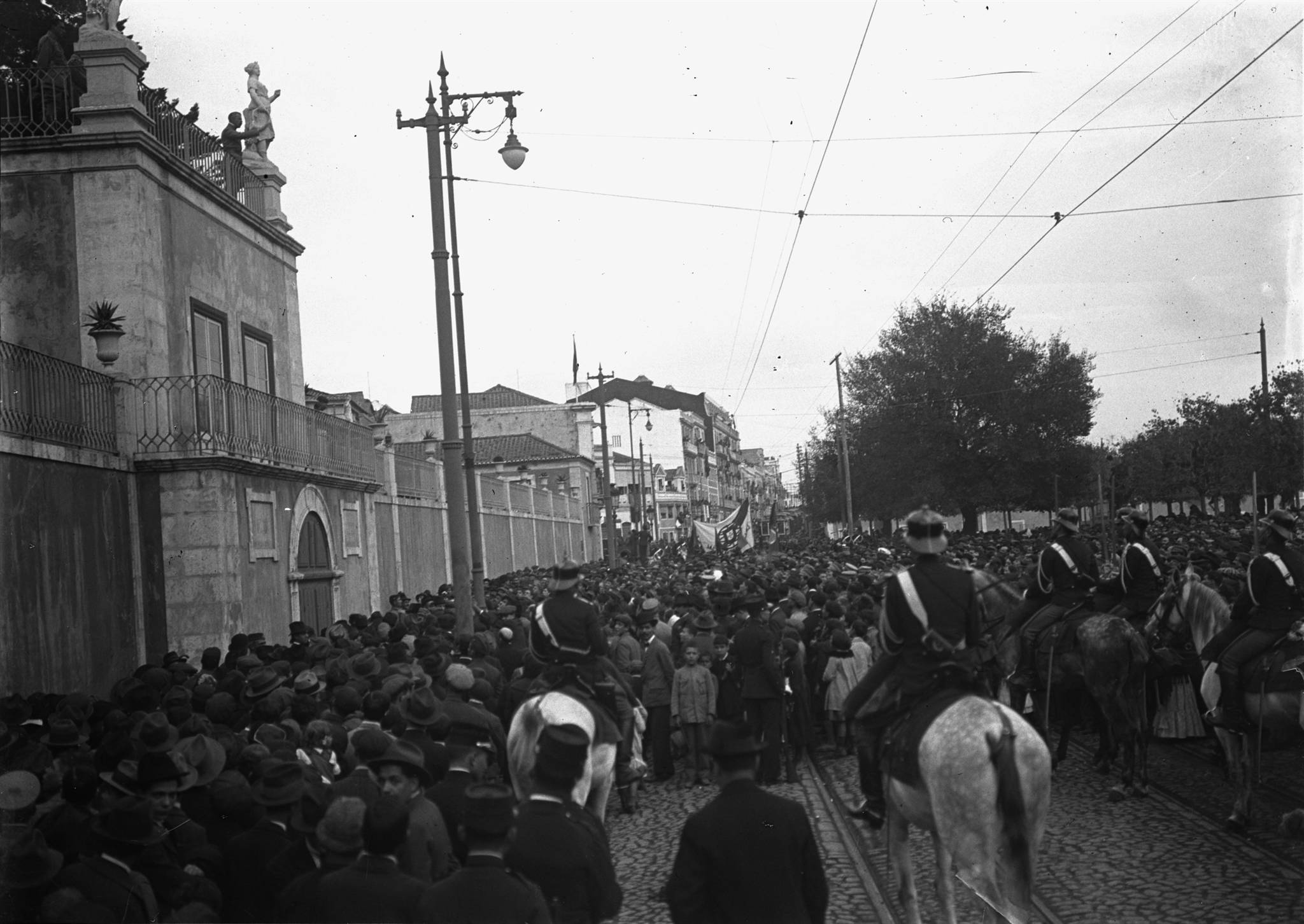 Título: Numa das varandas do palácio de Belém, Sidónio Pais, lê à multidão o telegrama do rei de Inglaterra felicitando Portugal pela sua participação na vitória dos aliados Dimensão: 9 x 12 cm Suporte: Negativo de gelatina e prata em vidro Nota de publicação : LISBOA. Câmara Municipal - Bellem Belém : Reguengo da cidade . Porto : Asa, 1990 Portugal Século XX - Crónica em Imagens 1910-1920, Joaquim Vieira, Círculo de Leitores 1999 LISBOAPHOTO, Lisboa, 2005 - Joshua Benoliel, 1873-1932 : repórter fotográfico. Lisboa : Câmara Municipal. Arquivo Fotográfico, 2005. 417 p. Ilustração Portuguesa, 1918, 18 de Novembro MENDES, Bernardo - O último regimento a cavalo em Portugal LISBOAPHOTO- Joshua Benoliel, 1873-1932: repórter fotográfico. Lisboa: Câmara Municipal Arquivo Fotográfico, 2005. ISBN 972-8517-44-0. p.303 Notas: Inscrição no original: 7712 Assunto: Guarda Nacional Republicana. 1911- / Candeeiro de rua / Palácio Nacional de Belém / Uniforme / Militar / Manifestação / Pais, Sidónio Bernardino Cardoso da Silva. Fl. 1918, presidente da República / Afonso de Albuquerque (praça, Belém, Lisboa, Portugal) Código de referência: PT/AMLSB/JBN/001445